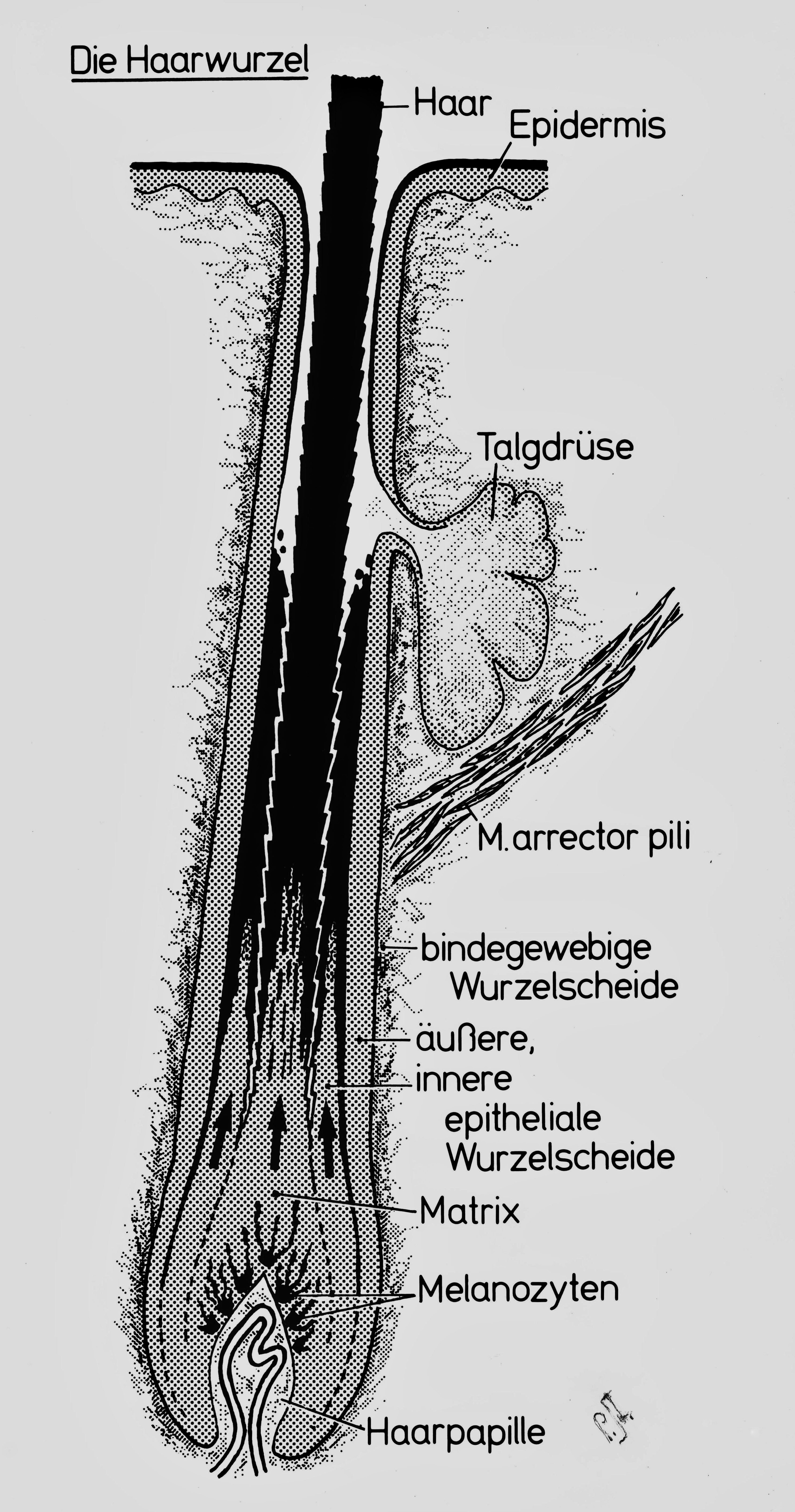 Schematischer Längsschnitt der Haarwurzel